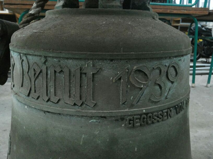 La cloche, don d'une paroisse allemande.